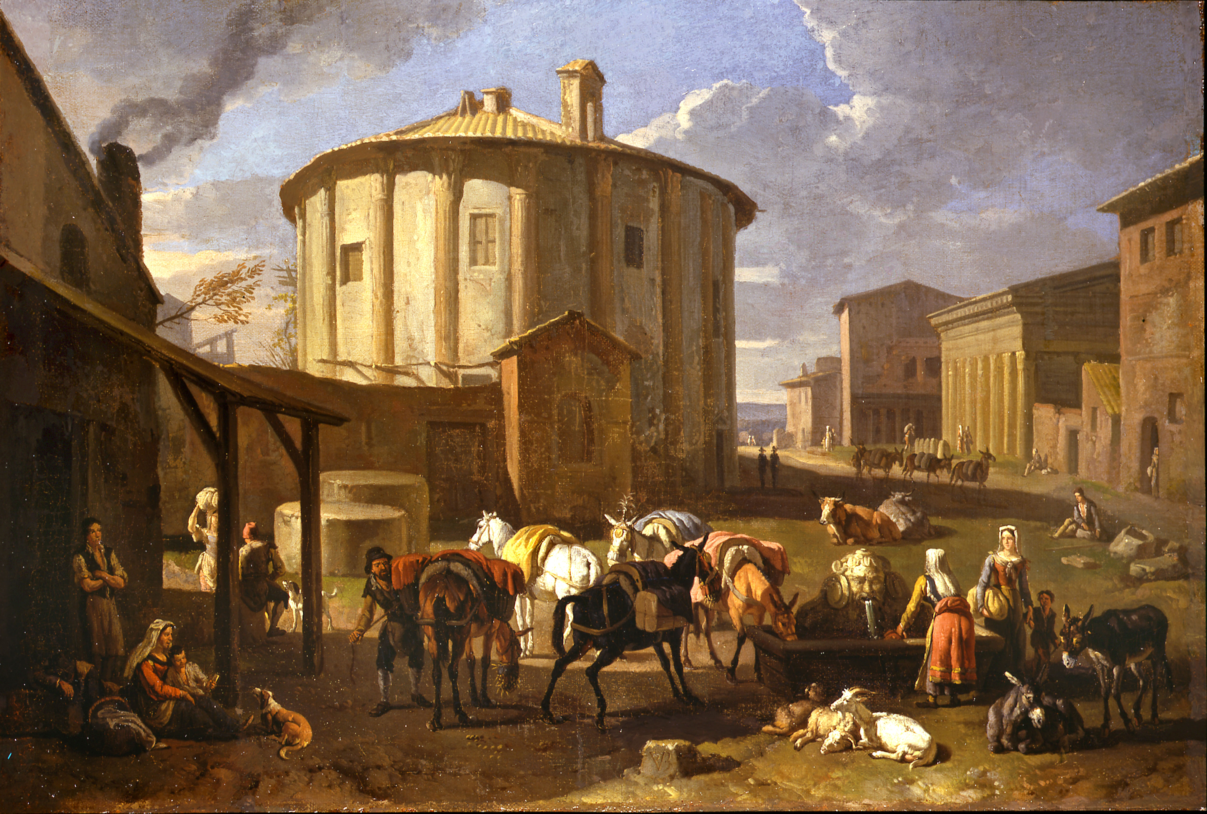 Tempio di Vestatitle QS:P1476,it:"Tempio di Vesta" label QS:Lit,"Tempio di Vesta"